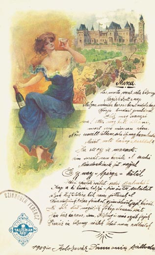 Rechnung von Josef Törley & Co. mit einer Darstellung vom Törley-Schloss in Budapest.